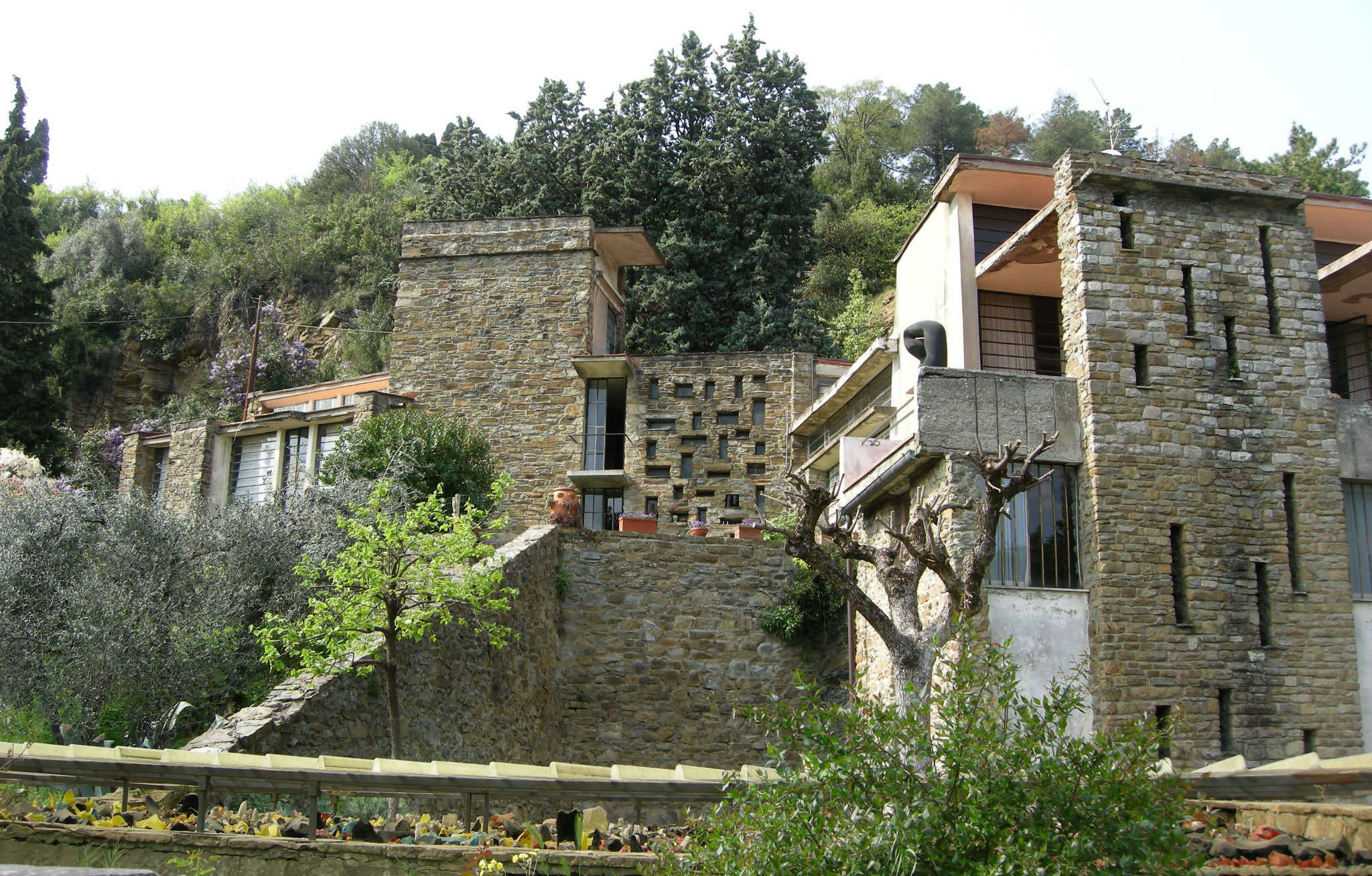 Casa-studio di Leonardo Ricci